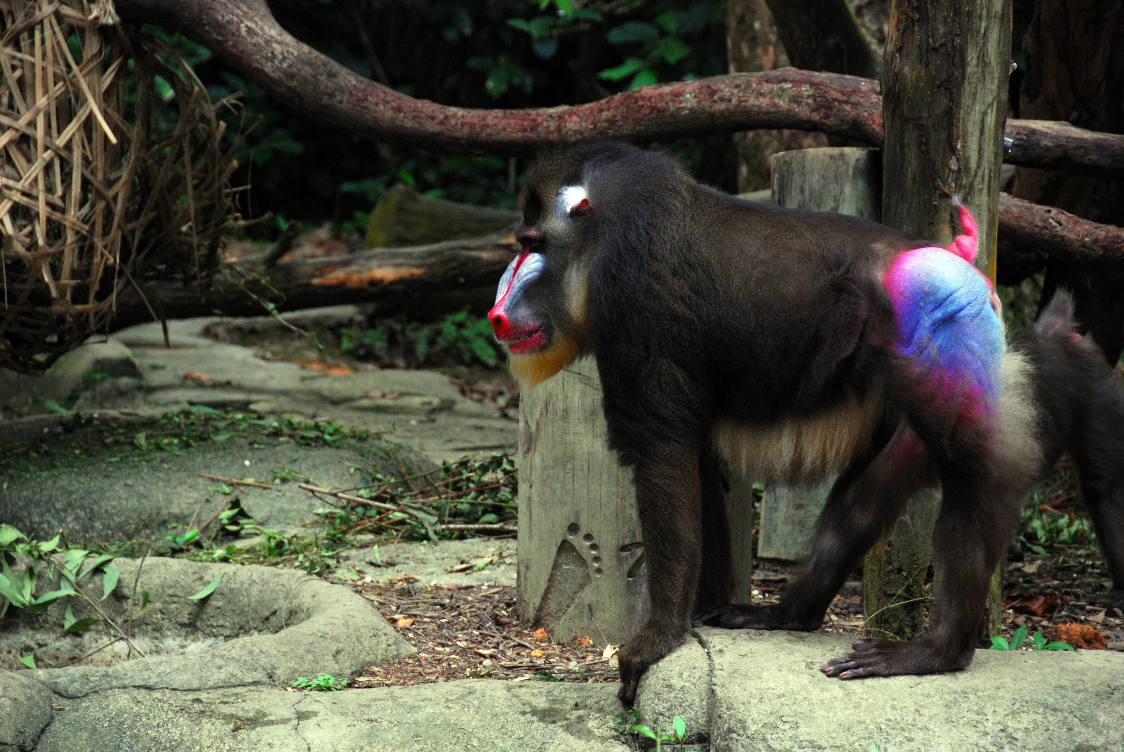 Mandrill at Singapore Zoo